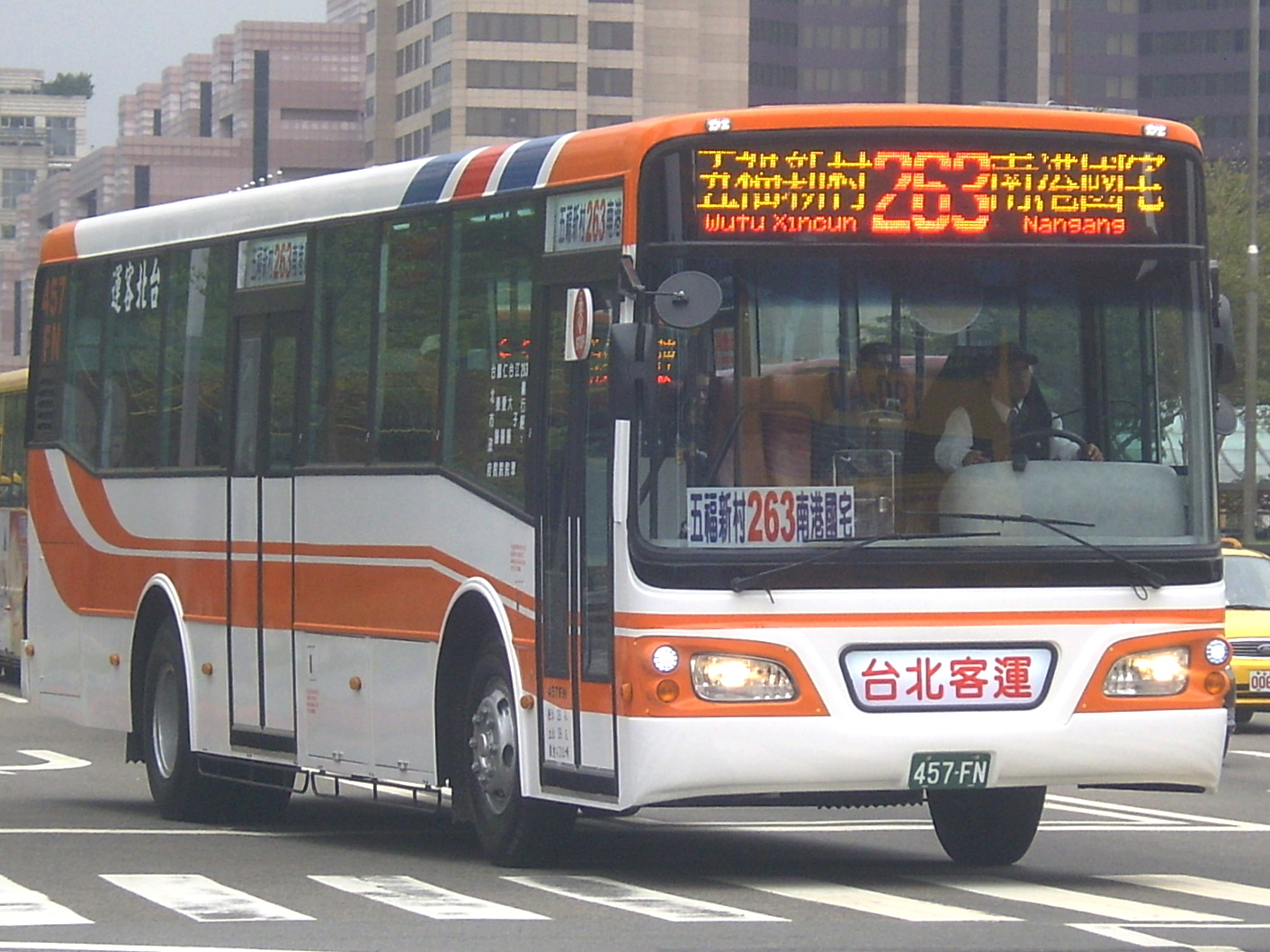 臺北客運日野RK8JRSA大客車457-FN。